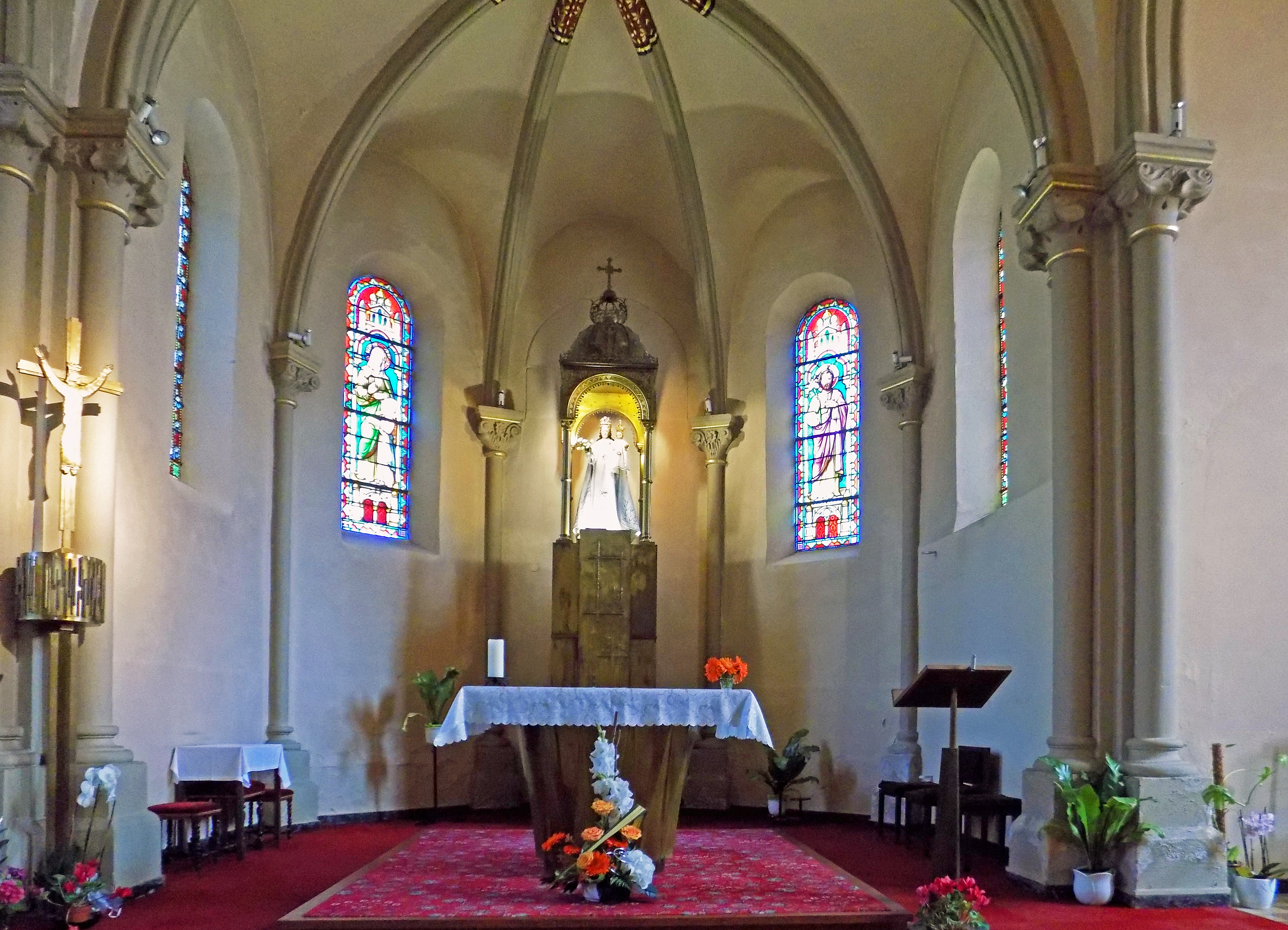 Basilique Notre-Dame-de-Bon-Secours de Saint-Avold, basilique mineure. Sanctuaire fondé au XVIe siècle et dédié à Notre-Dame-de-Bon-Secours. Pèlerinage marial. Vue du choeur.